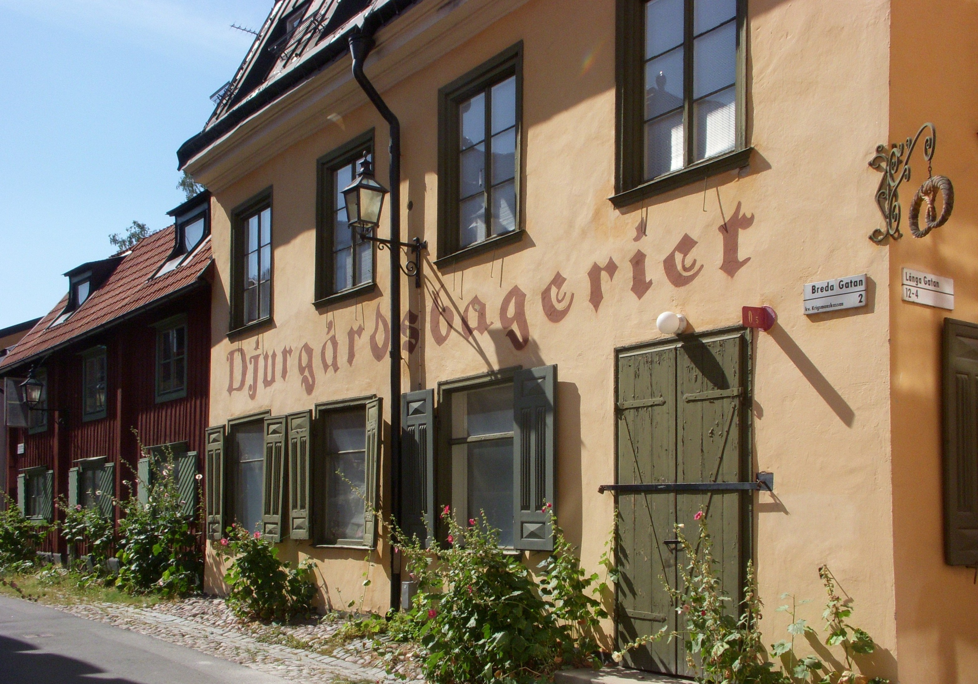 Djurgårdsbageriet, Djurgårdsstaden, Stockholm, arkitekt Per Axel Nyström.